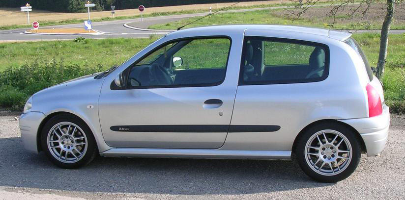 Renault Clio RS 2000 Titane